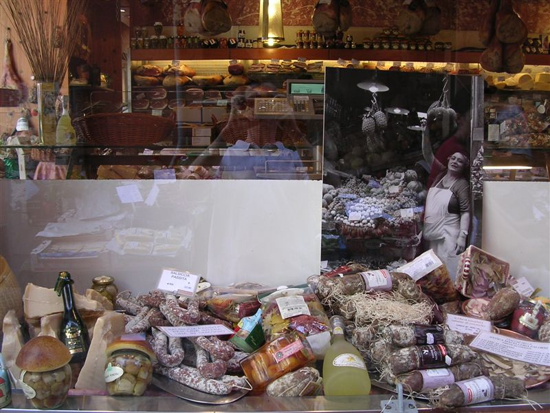 Vetrina di un negozio di gastronomia nel centro di Bologna, scattata da --L'uomo in ammollo 08:52, Ago 1, 2005 (CEST) Categoria:Immagini di Bologna